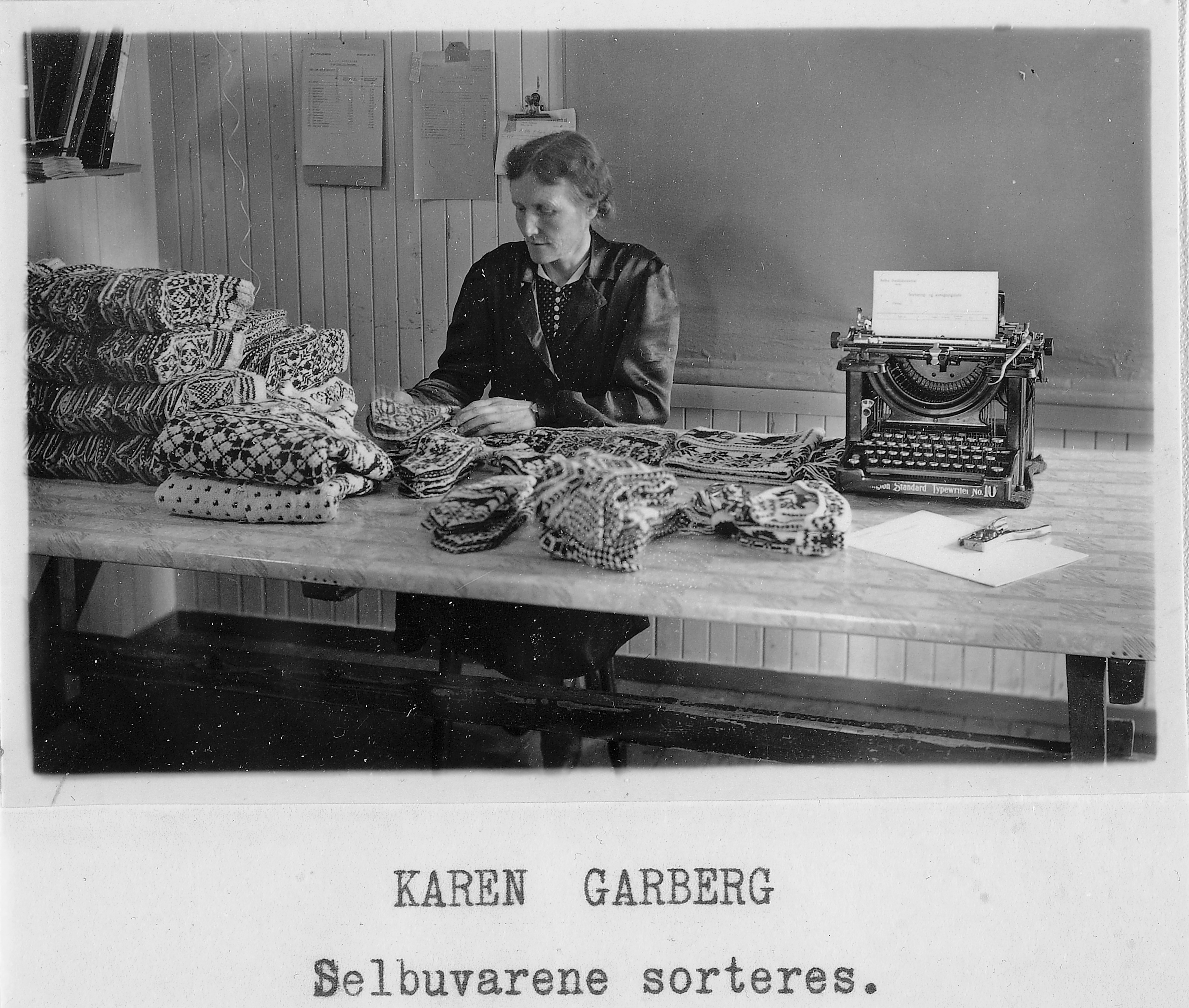 Bildet er hentet fra Arkivverket. Selbuvotter, luer, skjerf og andre strikkede plagg blir sortert av Karen Garberg. Arkivinstitusjon : Riksarkivet Arkivnavn : Landbruksdepartementet, Heimeyrkekontoret Sted : NORGE, Sør-Trøndelag, Selbu, Emneord: Strikking, Strikk, Håndarbeid, Kvinner, Selbustrikk Avbildet: Garberg, Karen